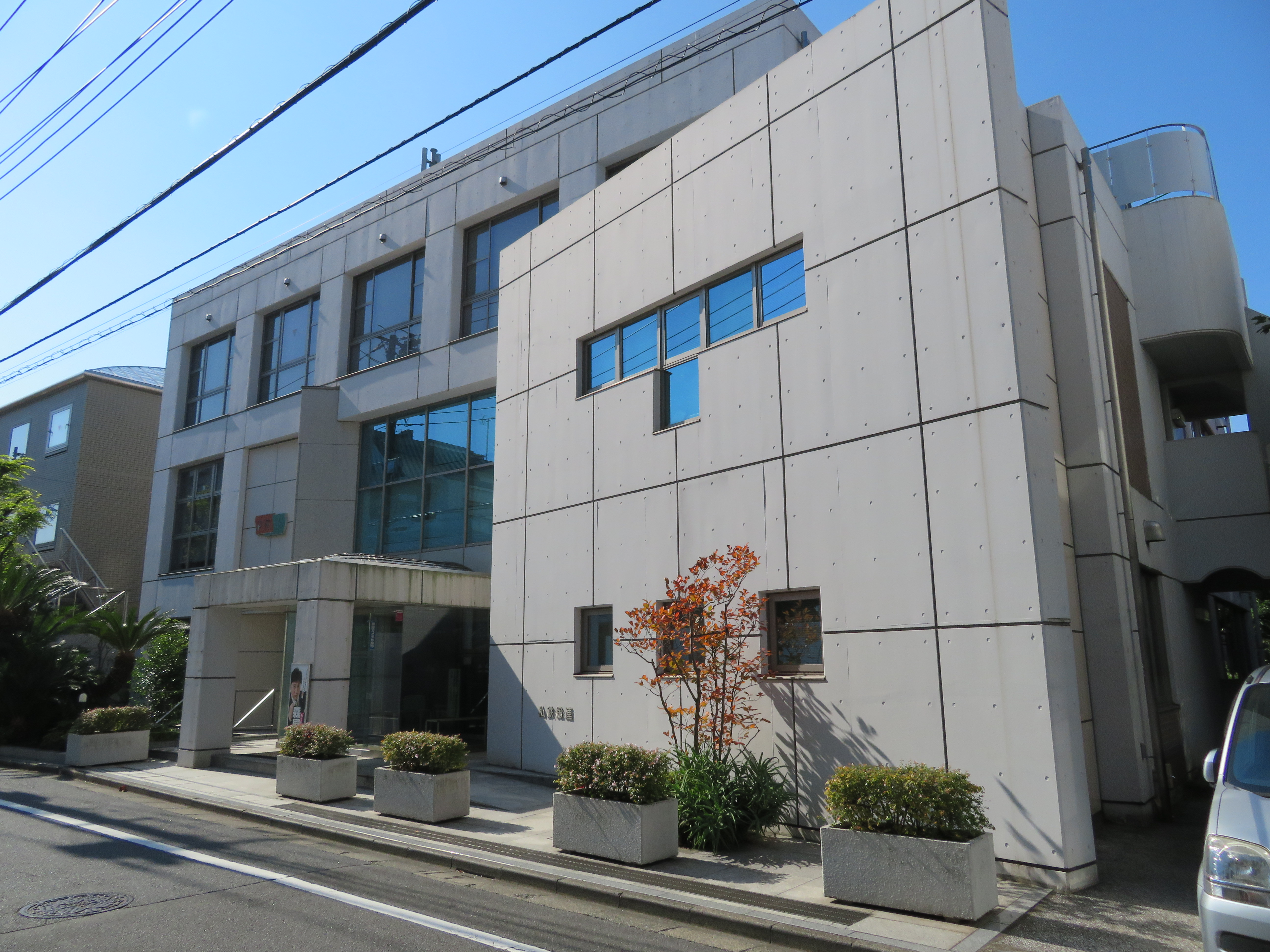 日本私鉄労働組合総連合会 本部